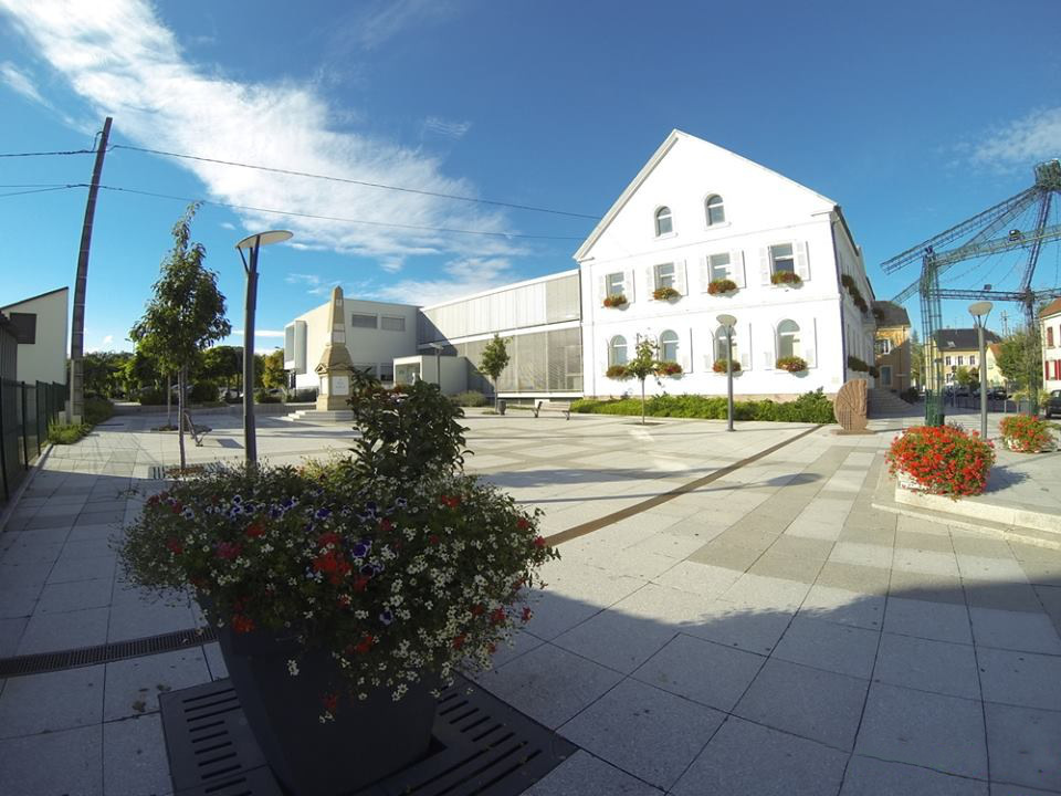 Place des Malgré Nous et Mairie de Wittenheim Photo offerte par dont Webcreators est l'éditeur à la communauté Wikipedia